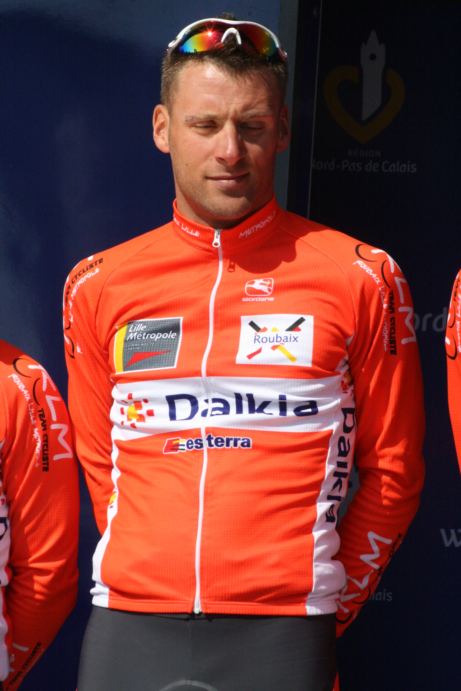 Présentation des coureurs au départ de la première étape Anthony Colin